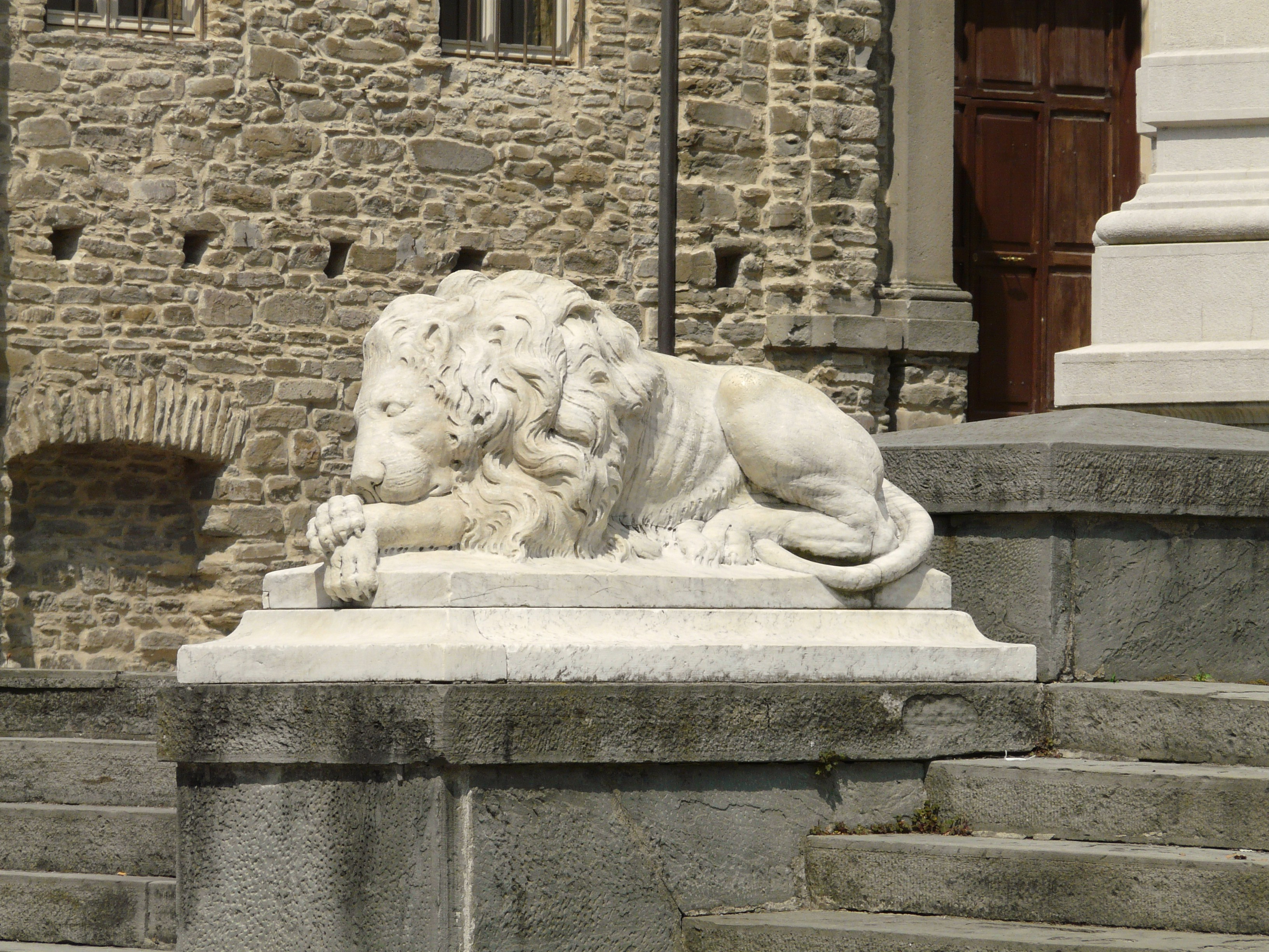 Chiesa di Sant'Antonino, Borgo Val di Taro, Emilia Romagna, Italia